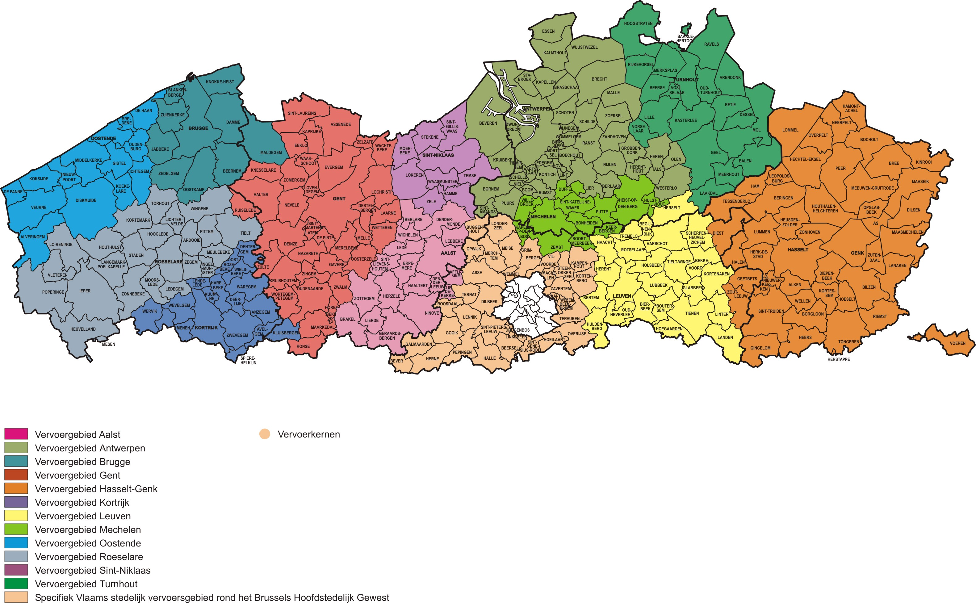 Vlaamse Vervoermaatschappij De Lijn - kaart van in 2002 afgebakende vervoerregio's